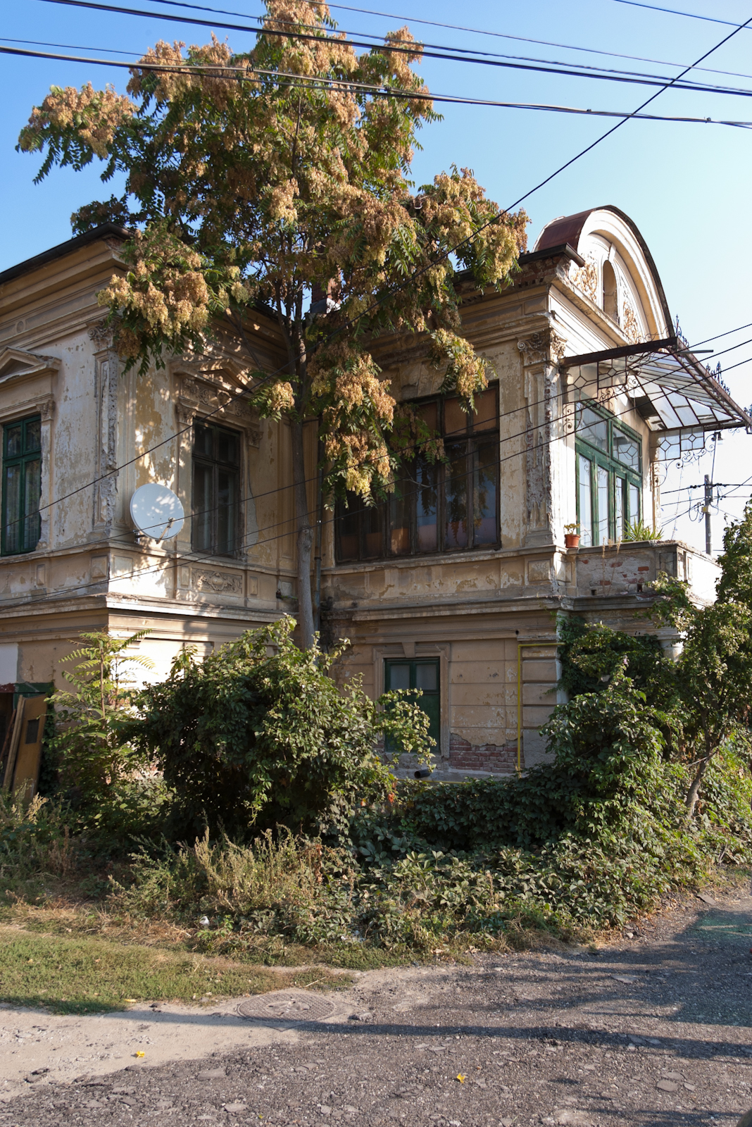 Fotografia prezinta casa Balota vazuta dinspre interiorul curtii. 01